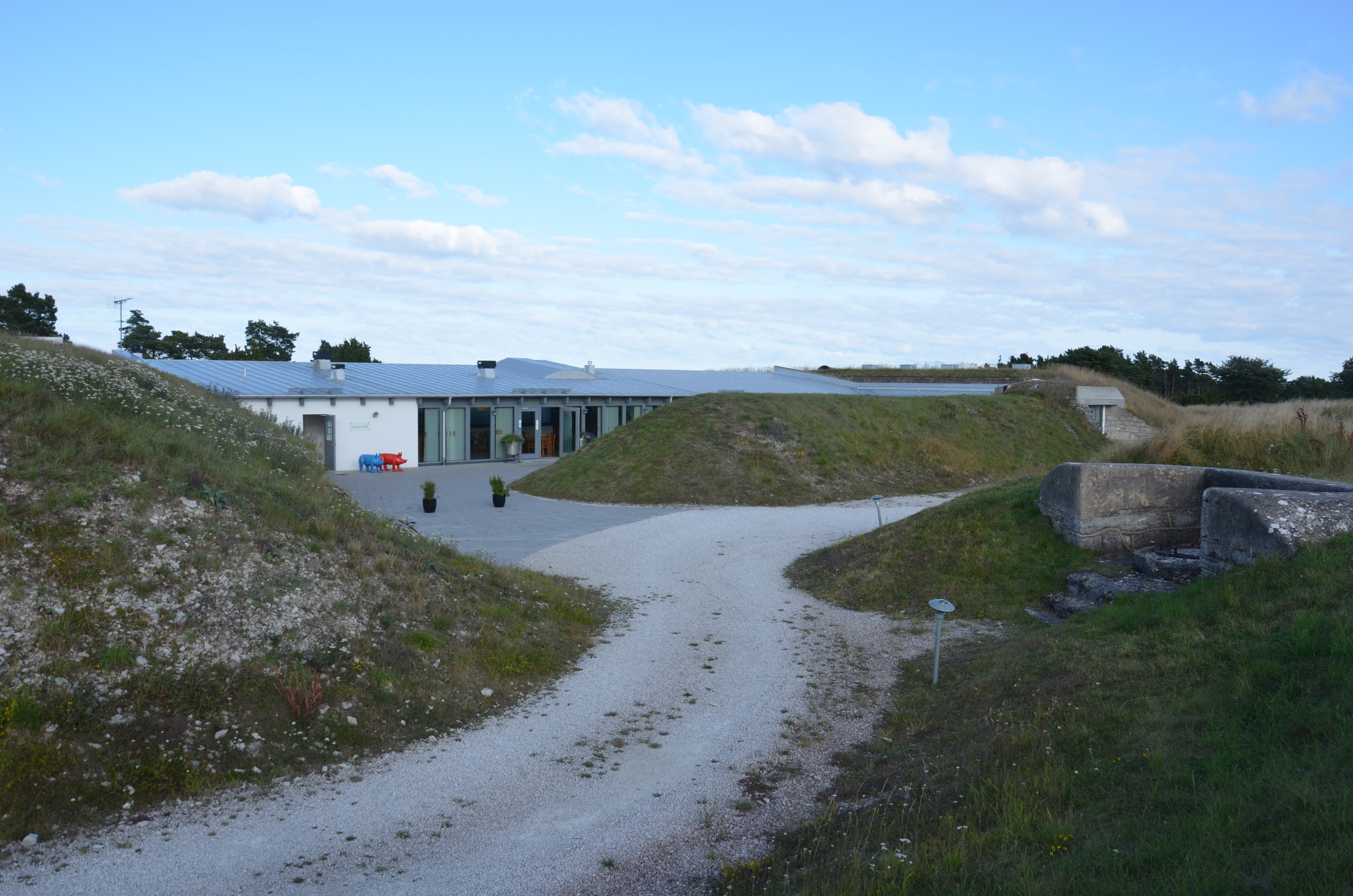 Fårösunds fästning, Fårösund, Gotland